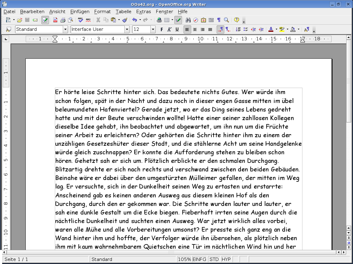 2.0 Writer (auf Linux)